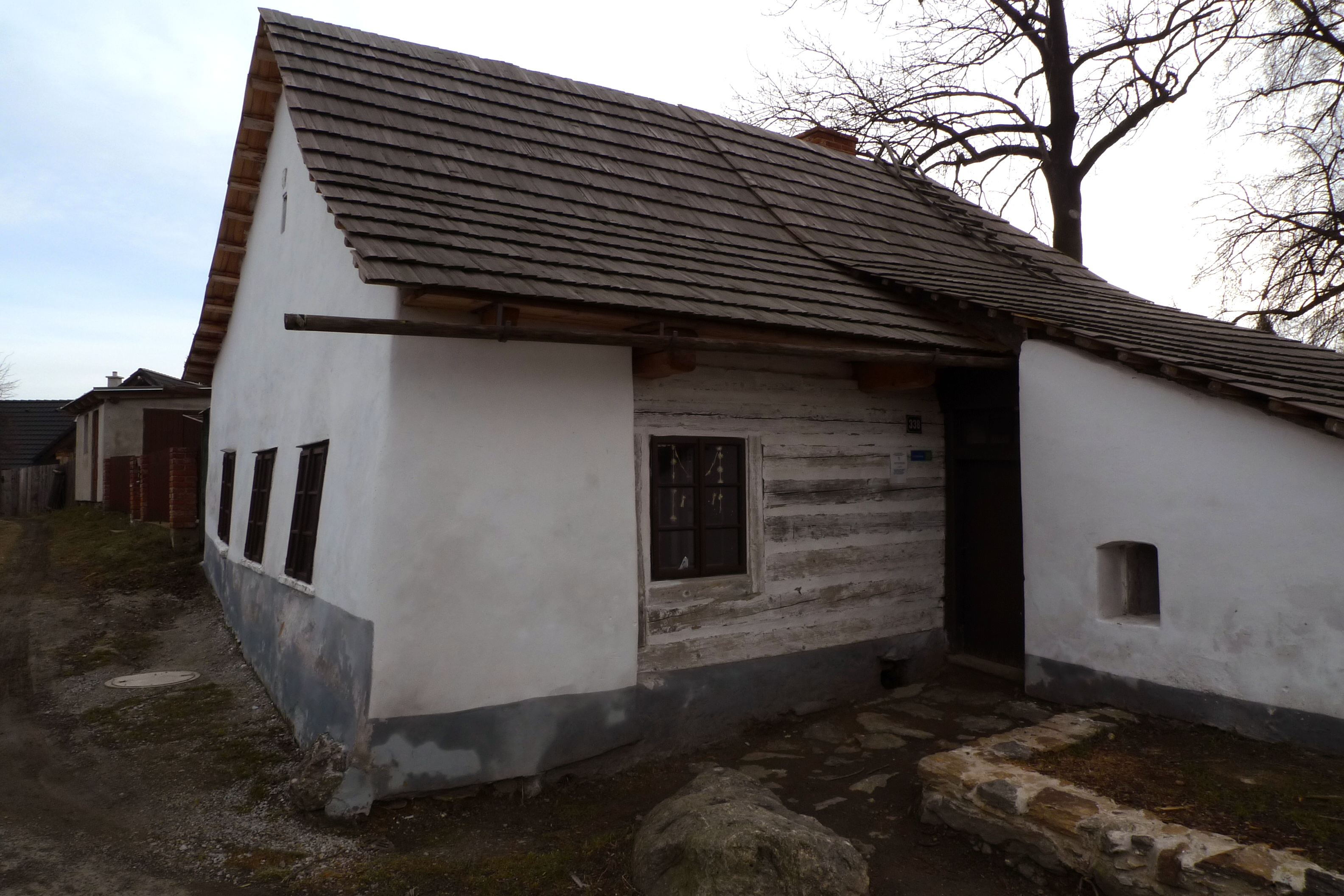 Městský dům (Humpolec), Zichpil 338, Humpolec